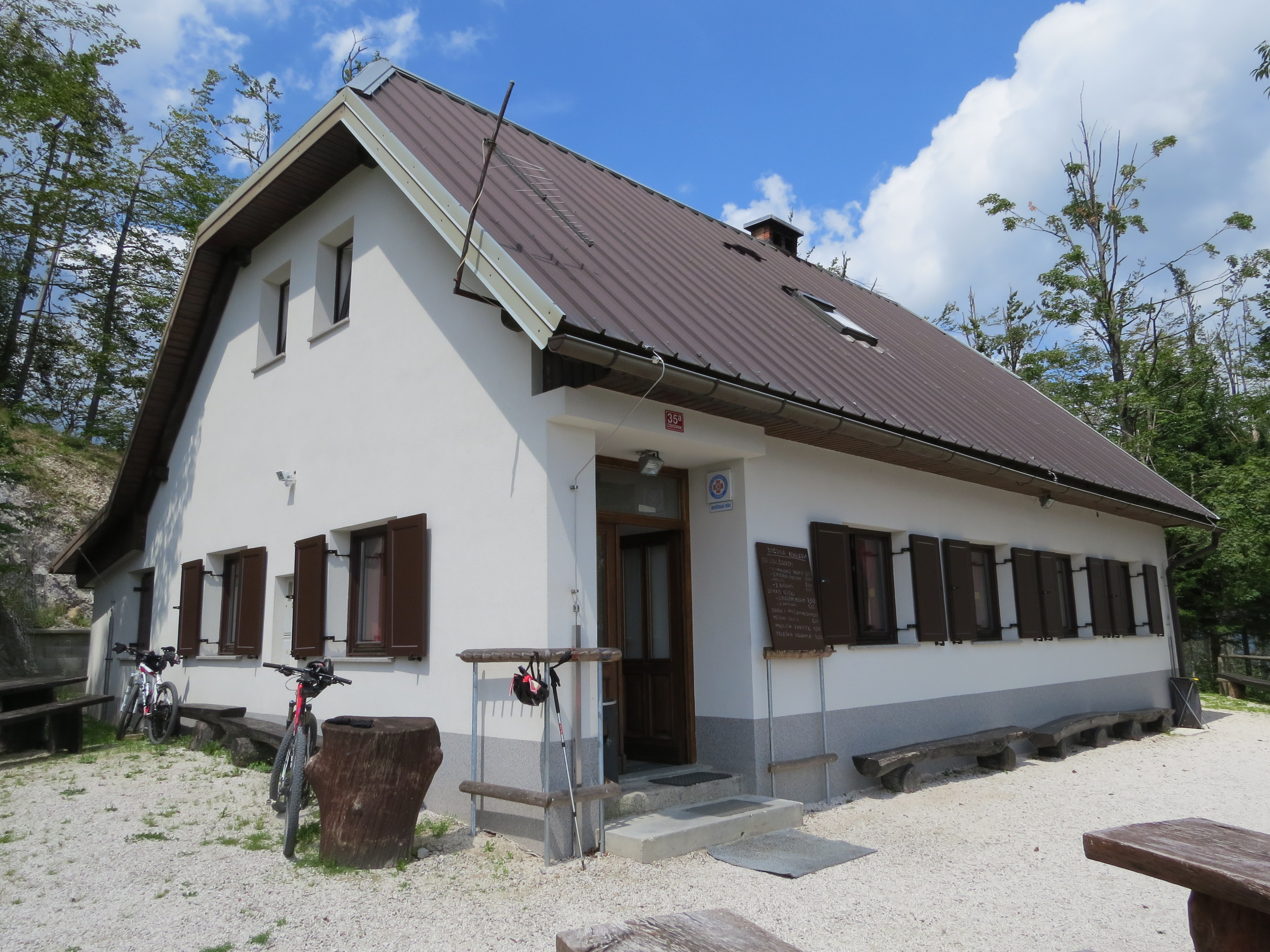 Koča na Hleviški planini.